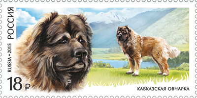 Серия «Фауна России. Служебные породы собак»